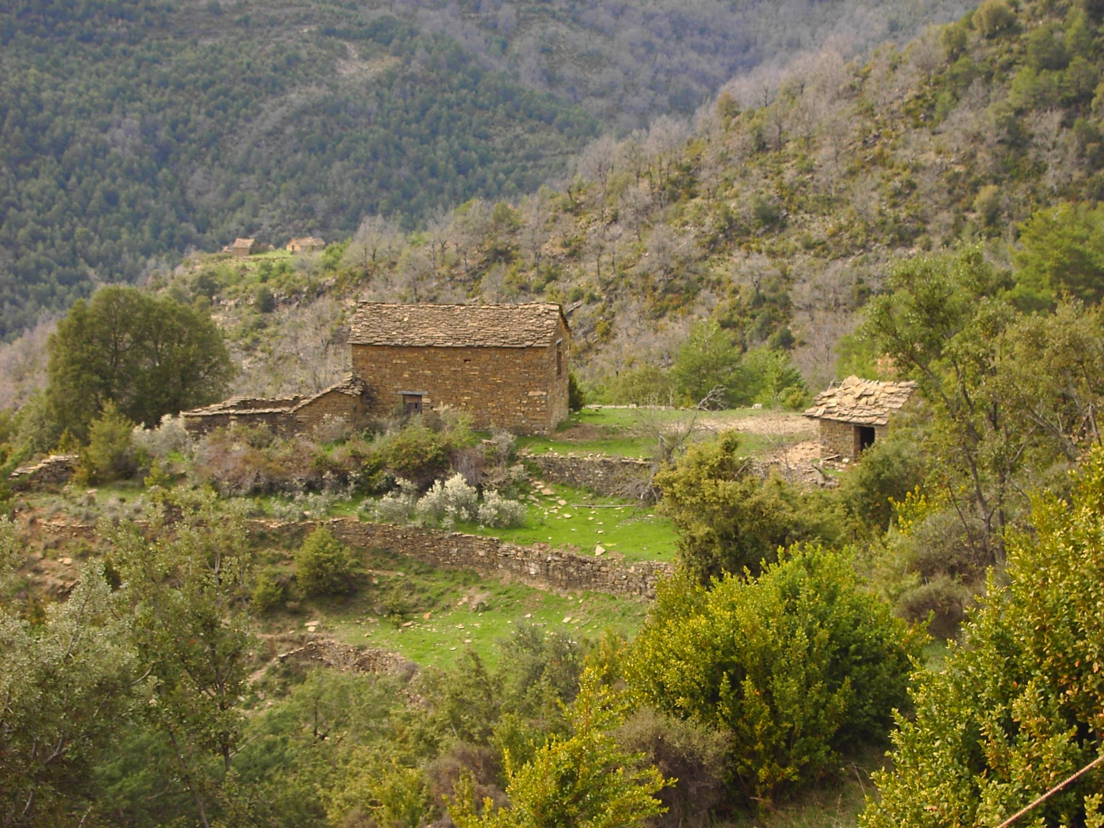 Aragonés: Bordas en os garroz d'a solana de Cañimars.